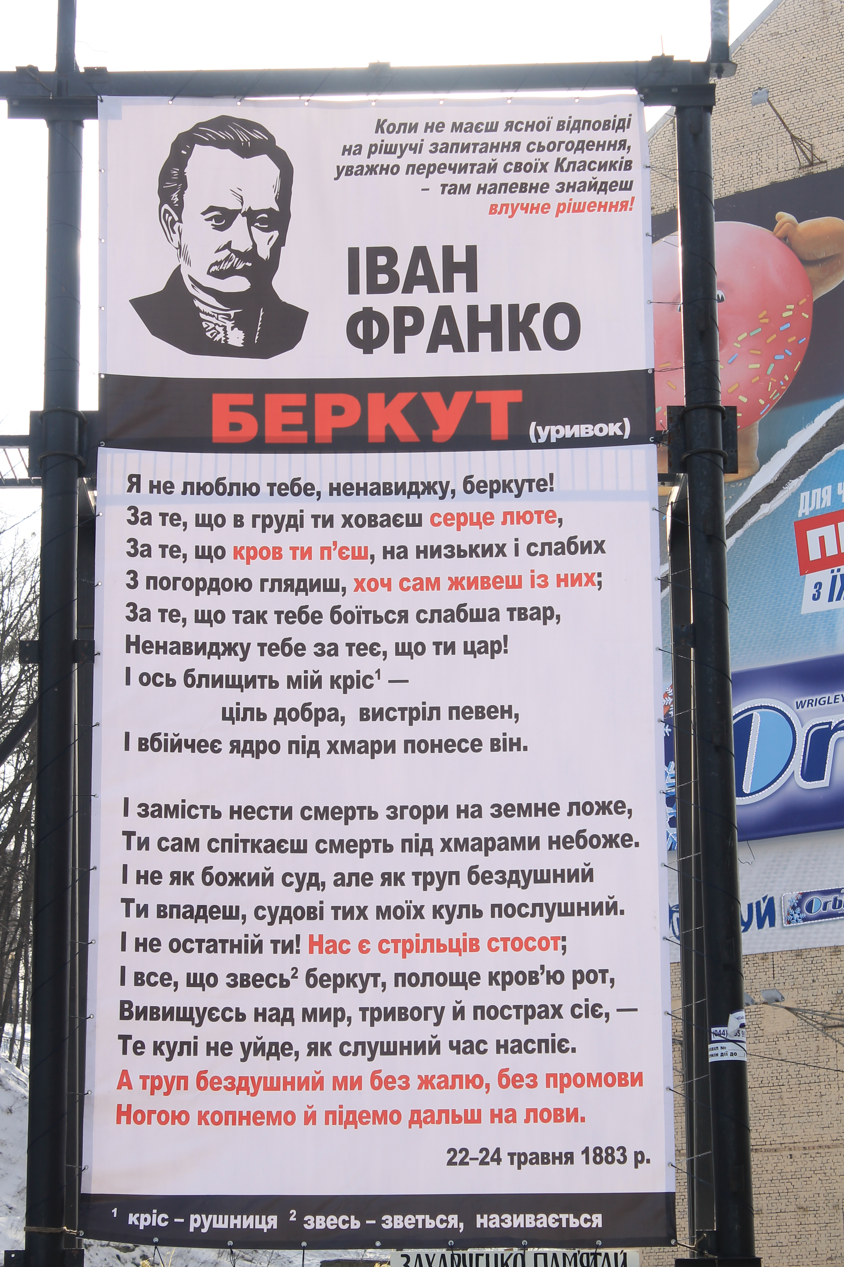 Київ 29 січня 2014. Плакат на Європейській площі